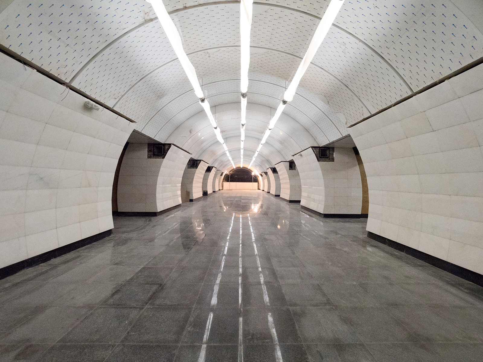 Центральный зал